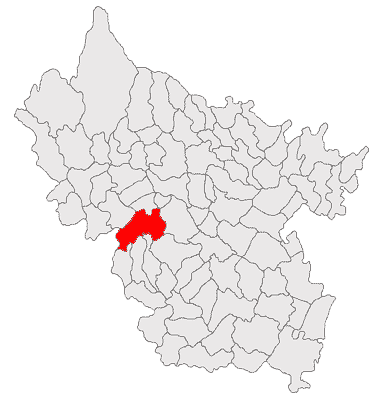 Categorie:Hărţi ale judeţului Buzău